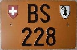 Sonderfahrzeugnummer back BS